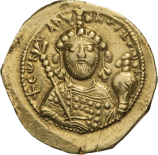 Константин IX Мономах (1042—1055). Номисма тетартерон. Константинополь. Реверс. Бюст Константина IX с бородой, в фас; на голове корона с крестом; в правой руке лабарум, в левой — держава с крестом. Точечный ободок.